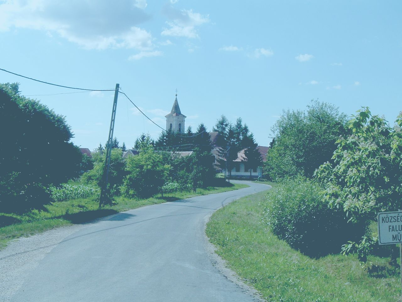 Szentléránt (Sorkifalud), Hungary